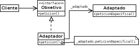 Opción dous de deseño do patrón adaptador.